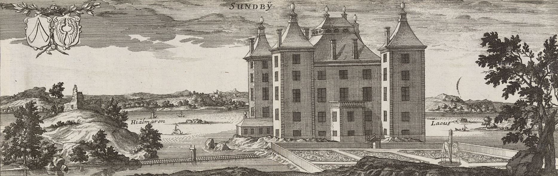 Stora Sundby slott i Sueciaverket